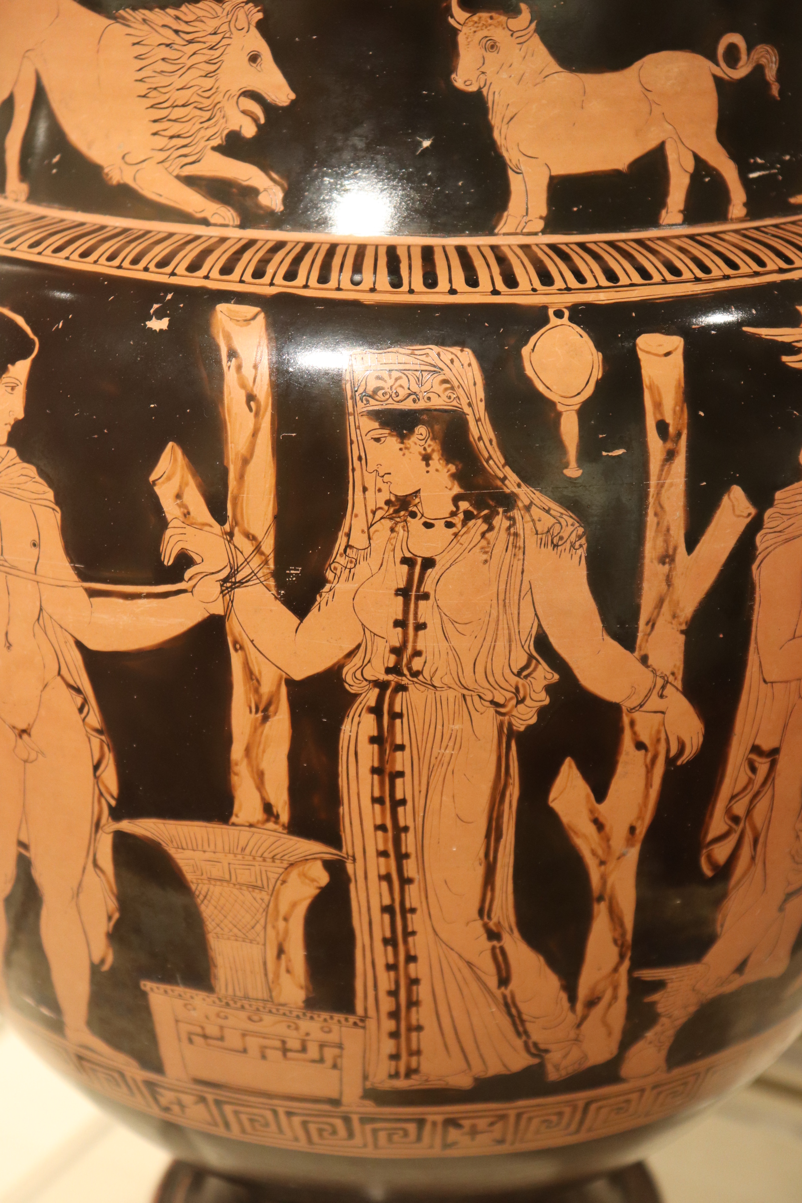 Cratere a volute, Gruppo del Pittore di Sisifo/Pittore delle Carnee